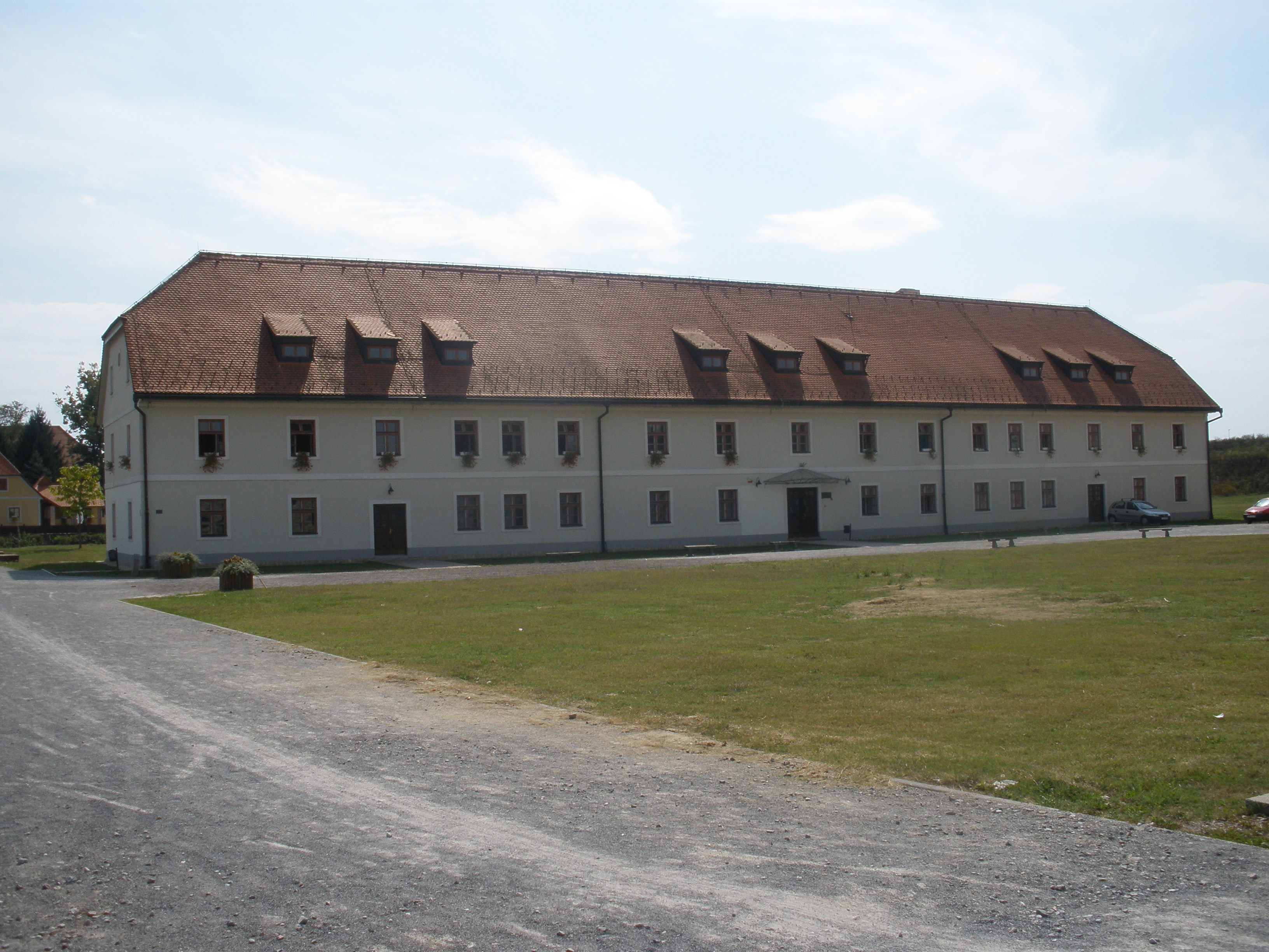 Klasična gimnazija fra Marijana Lanosovića u Slavonskome Brodu.